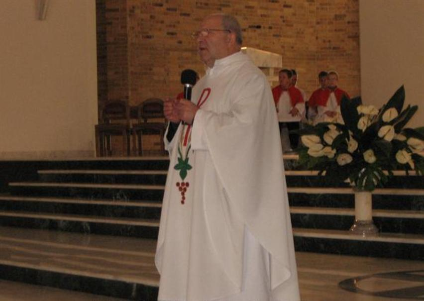 Ks. prob. Zygmunt Zawitkowski